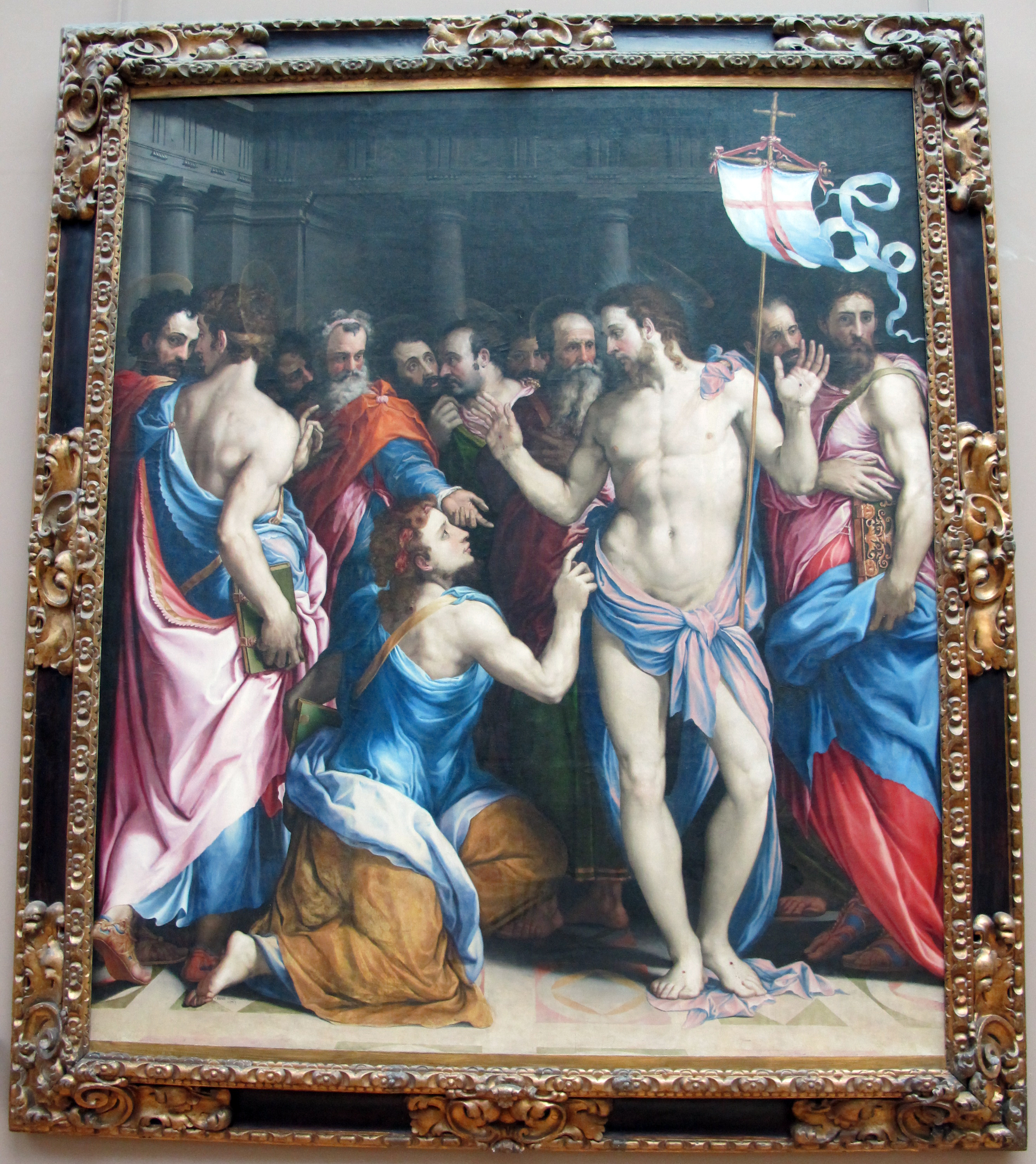 Pittura italiana del Cinquecento, Louvre